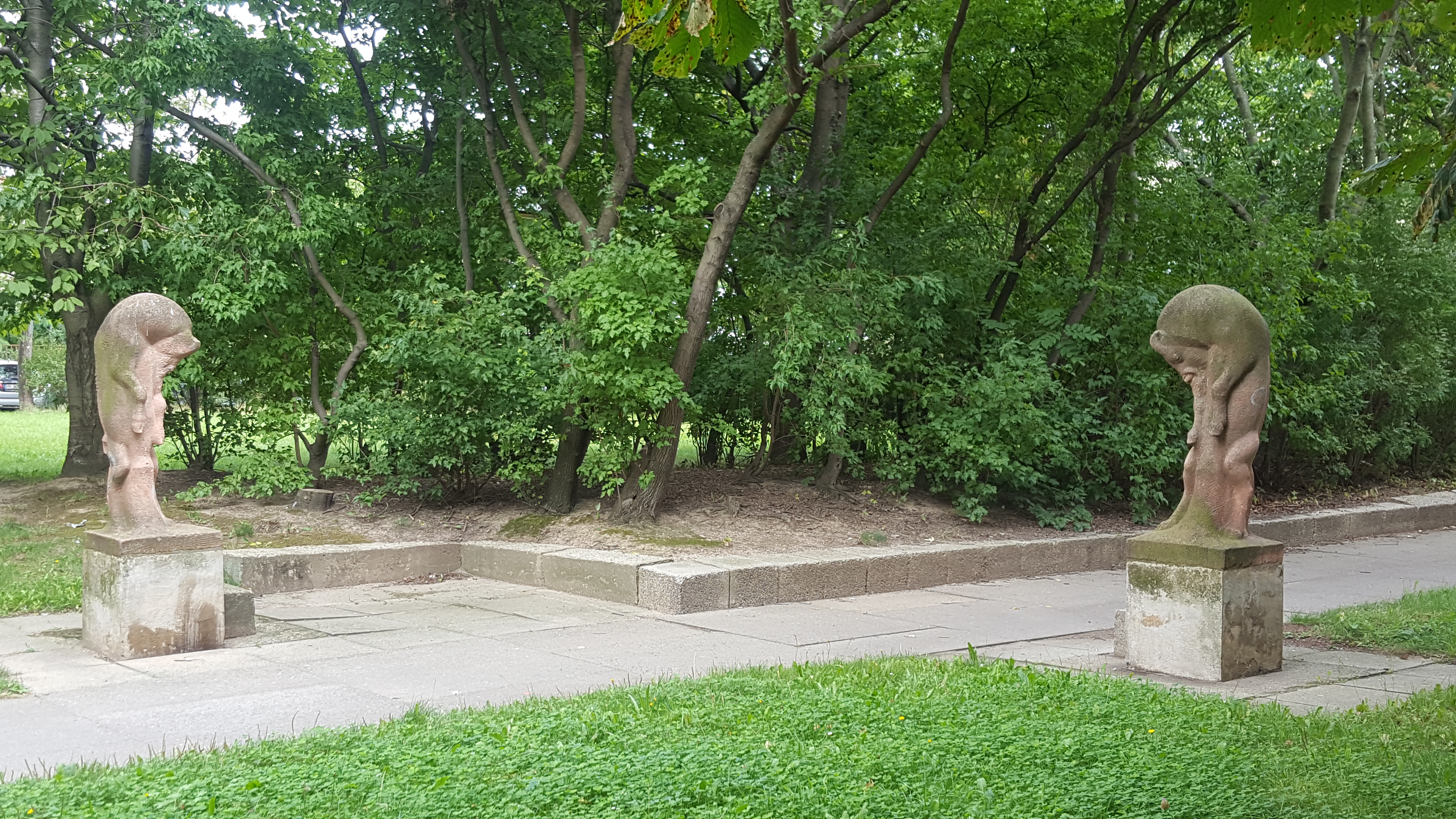 Dresden, Papstdorfer Straße 39, Kämpfende Ziegenböcke vom Dresdner Bildhauer Wolfram Hesse.